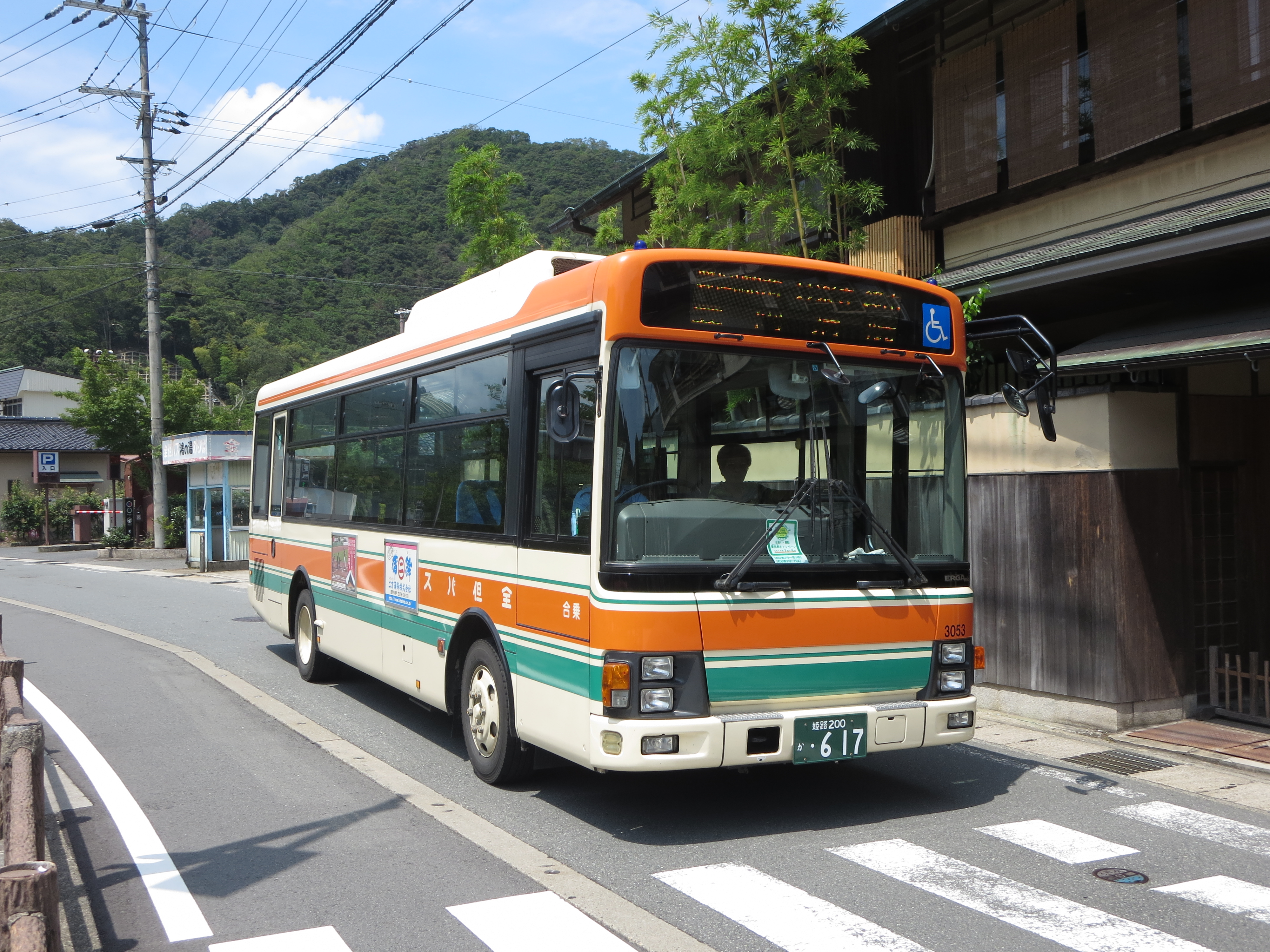 全但バス 城崎温泉・温泉寺付近公道上より撮影